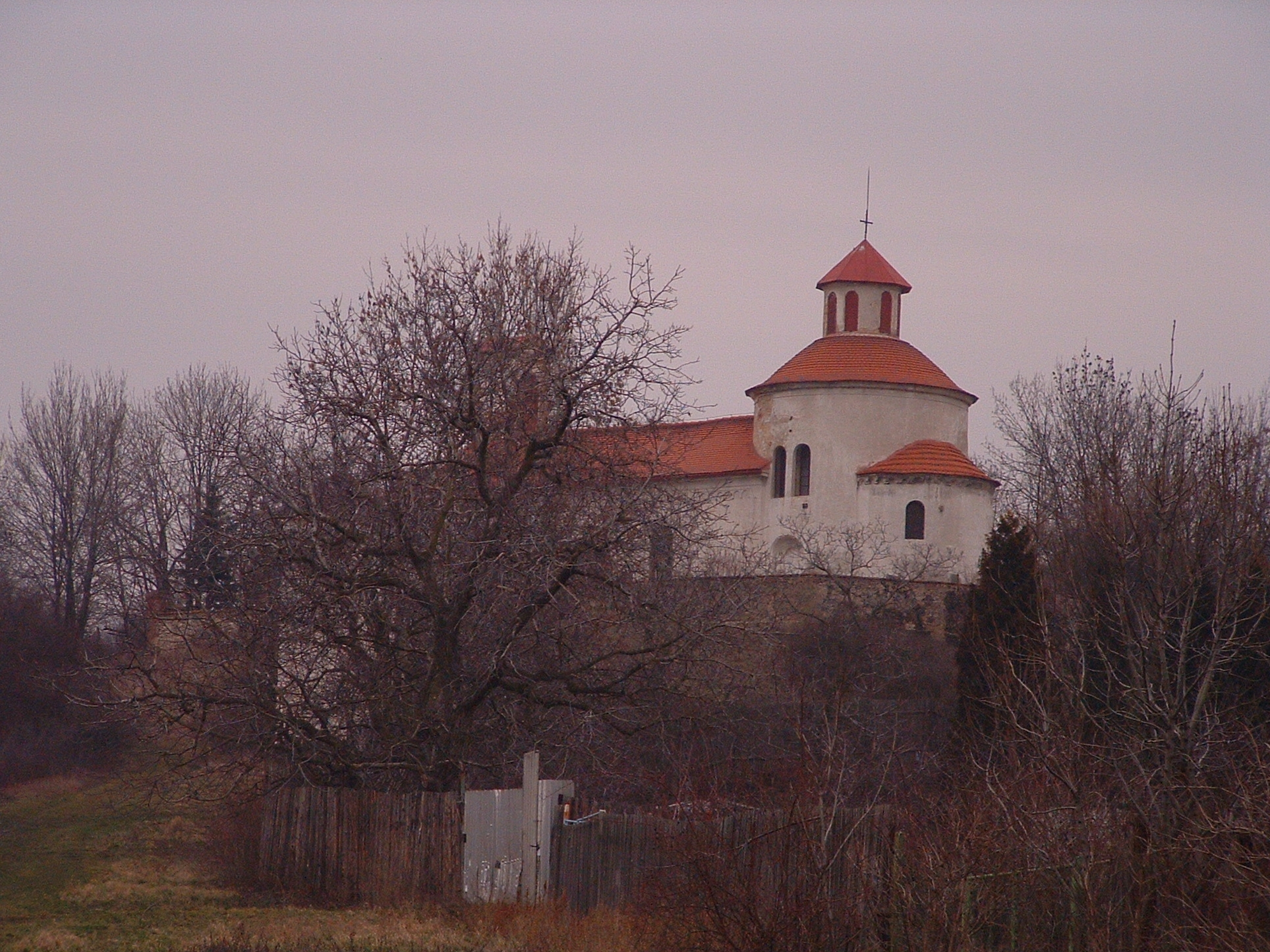 Kostel sv. Petra a Pavla, pohled od jihu